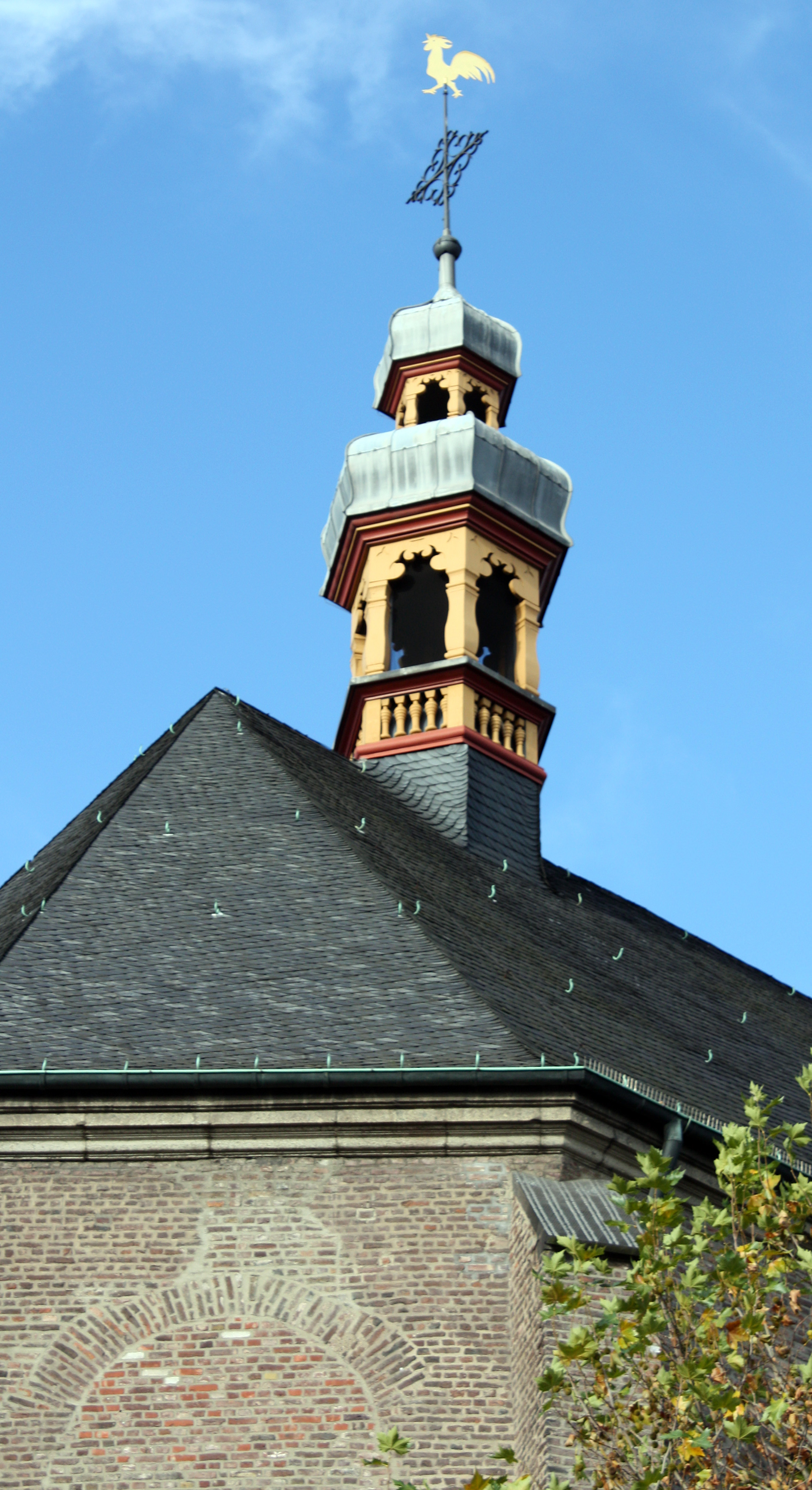 Köln, St. Maria in der Kupfergasse, Dachreiter